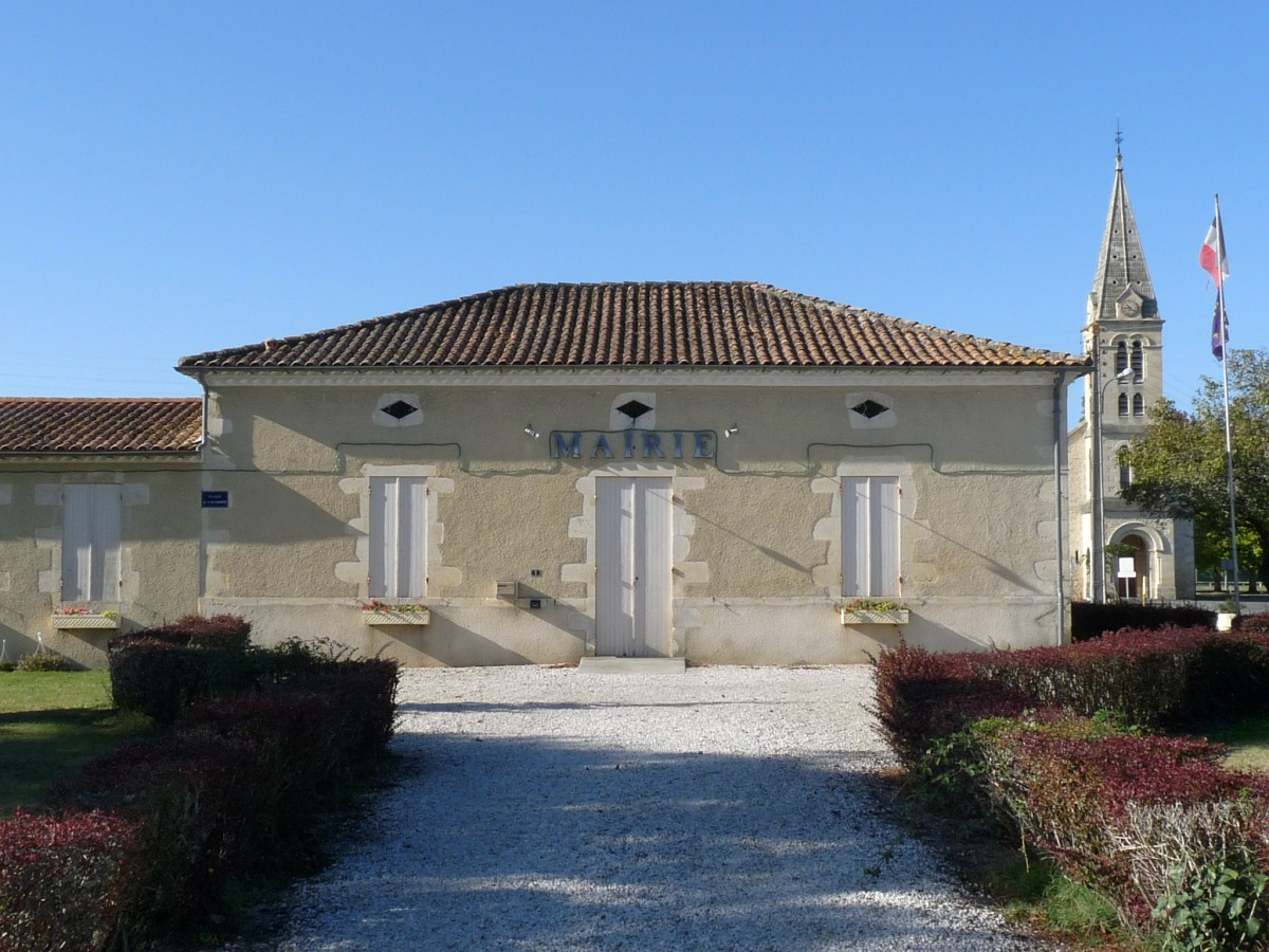 mairie de Naujac-sur-Mer, Gironde, France